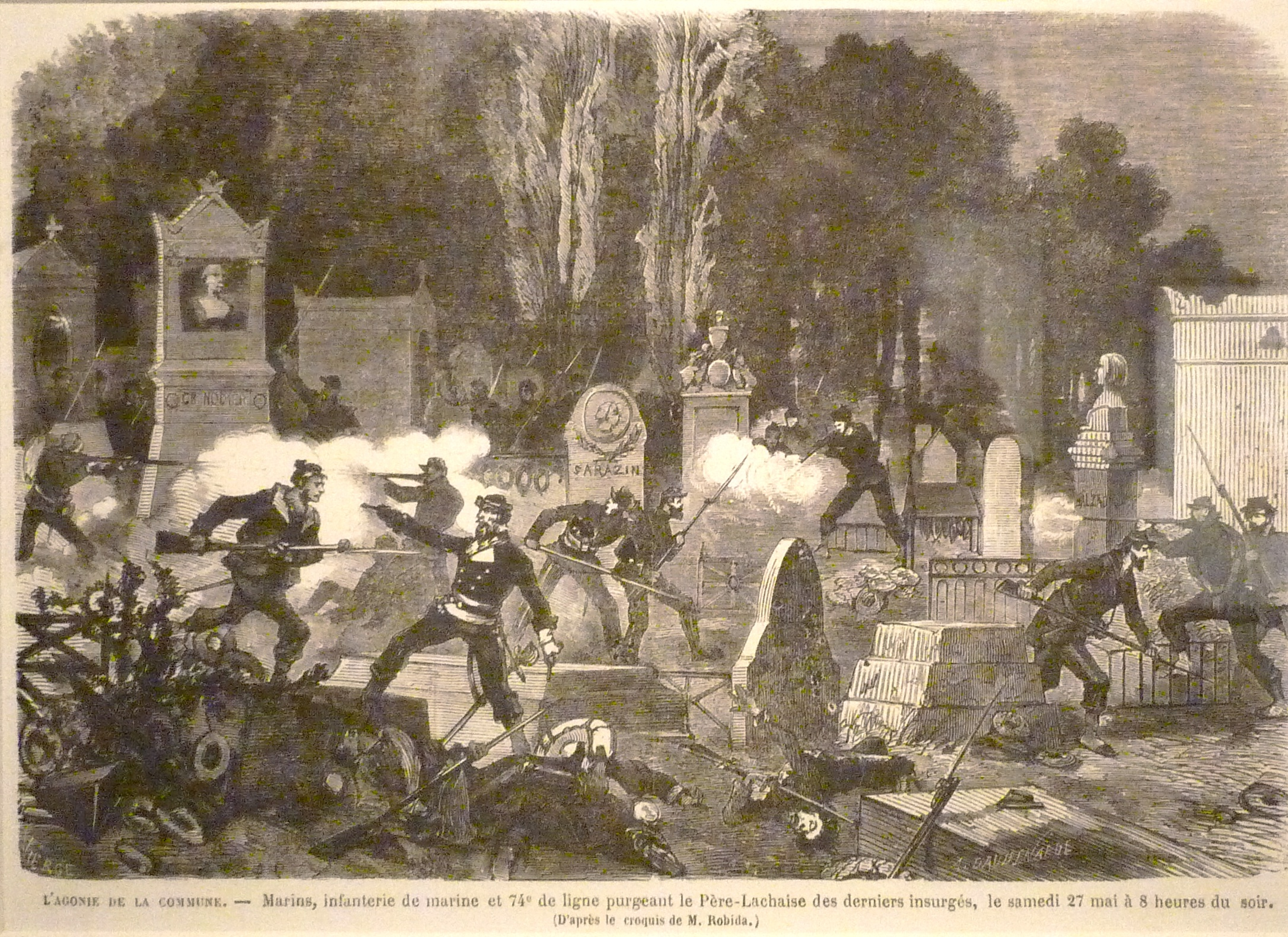 Exposition La Commune de Paris à l'Hôtel de Ville de Paris (18 mars - 28 mai 2011) - 27 mai : derniers combats au cimetière du Père-Lachaise - Gravure d'Amédée Daudenarde pour Le Monde illustré du 24 juin 1871 - Bibliothèque historique de la Ville de Paris.